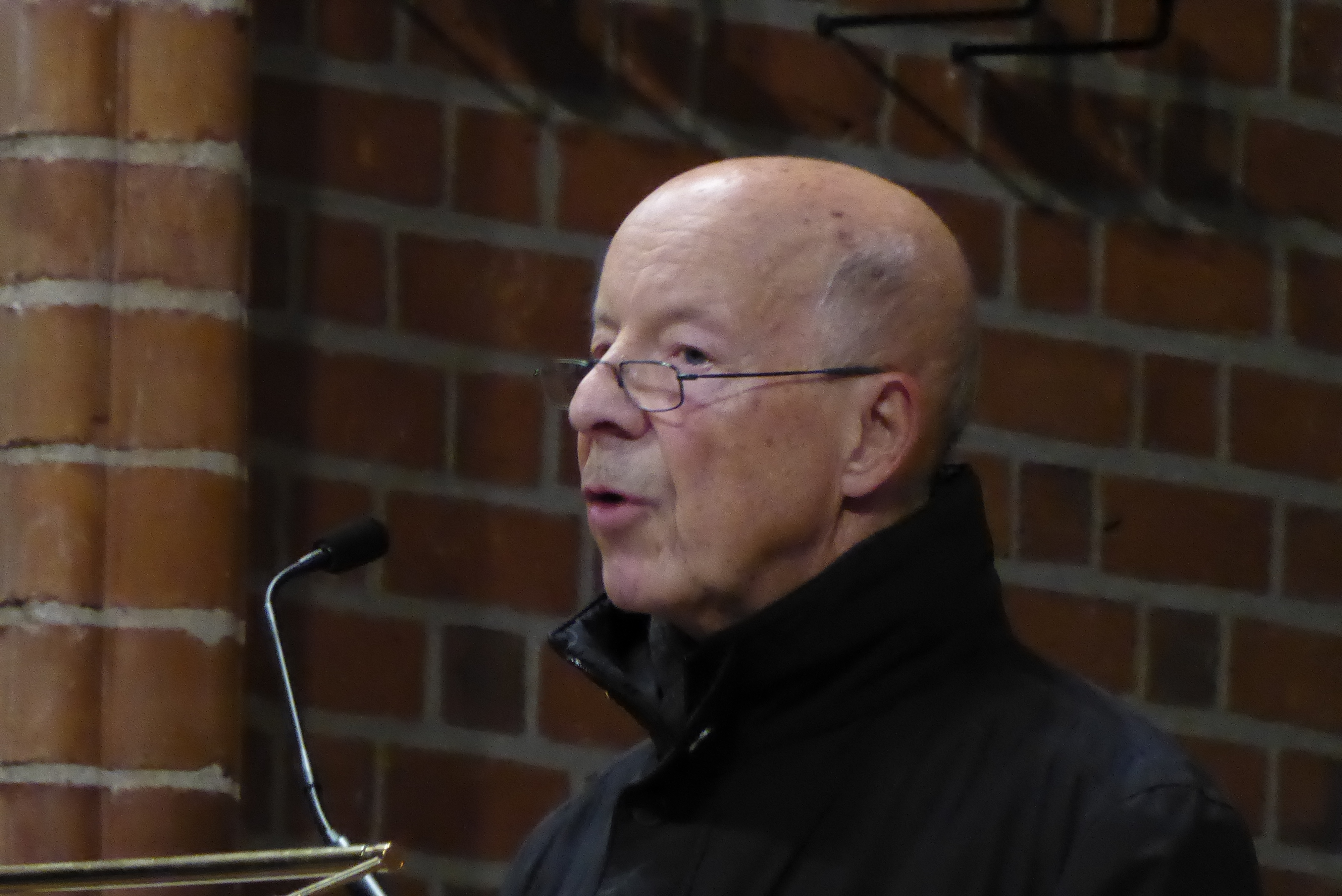 Gedenkkonzert zur Reichspogromnacht, am 7. November 2015 in der Marktkirche Hannover mit dem Europäischen Synagogalchor. Lesung: Ernst Erich Buder.